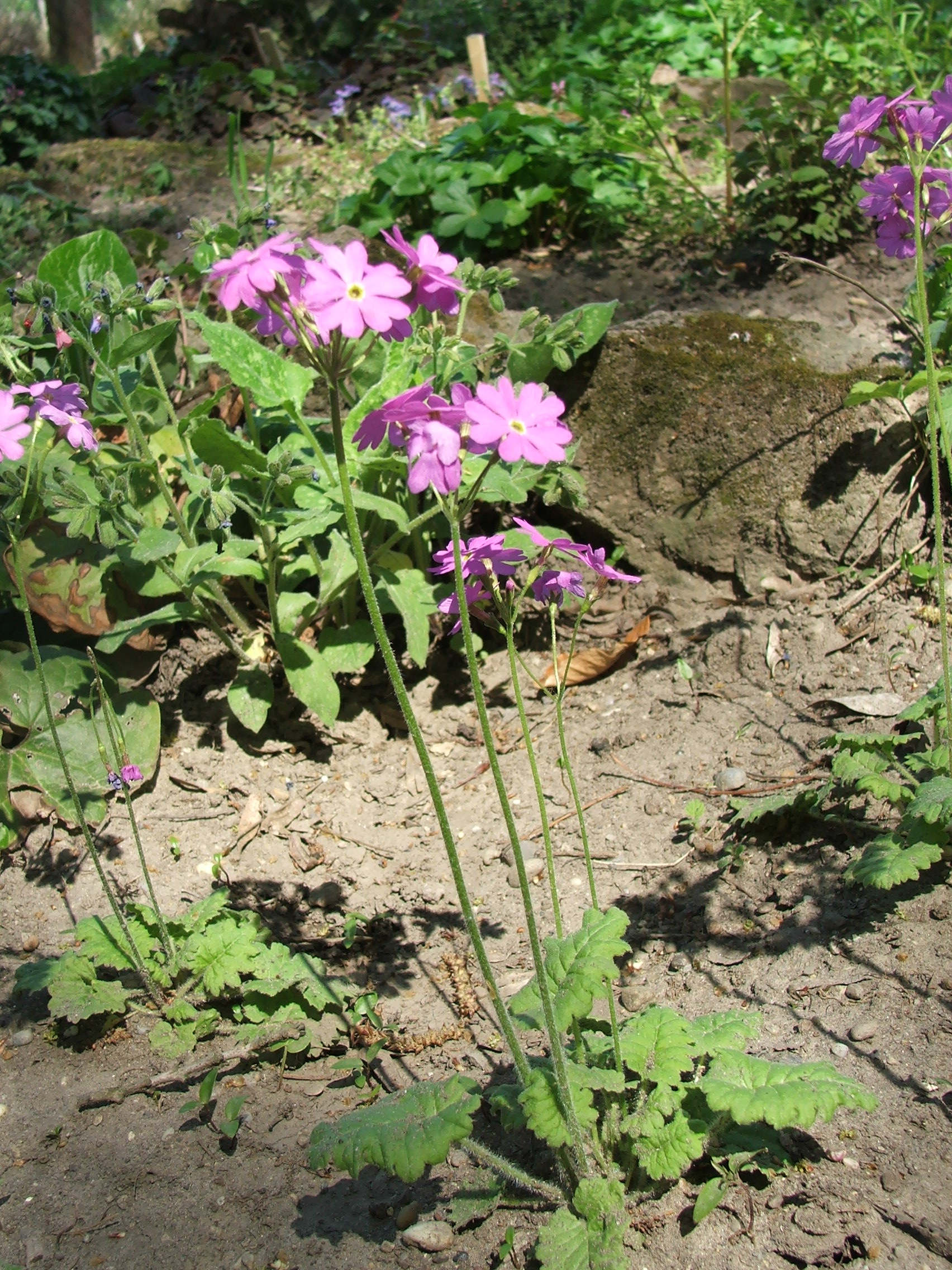 Primula cortusoides L. MTA Botanic Garden Vácrátót, Hungary.